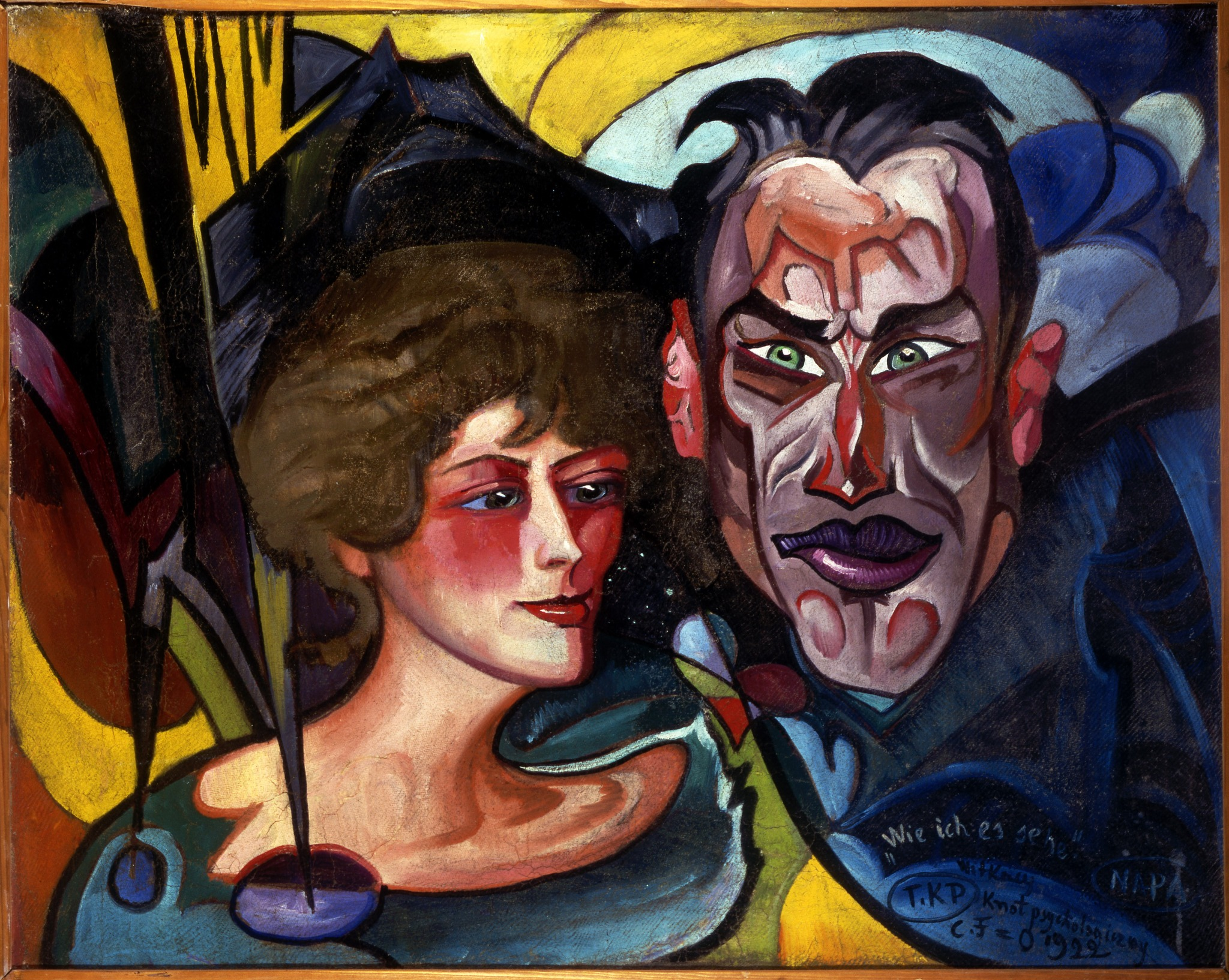 "Portret Anny i Jarosława Iwaszkiewiczów", olej na płótnie, 75 x 96 cm, Muzeum im. Anny i Jarosława Iwaszkiewiczów, Stawisko